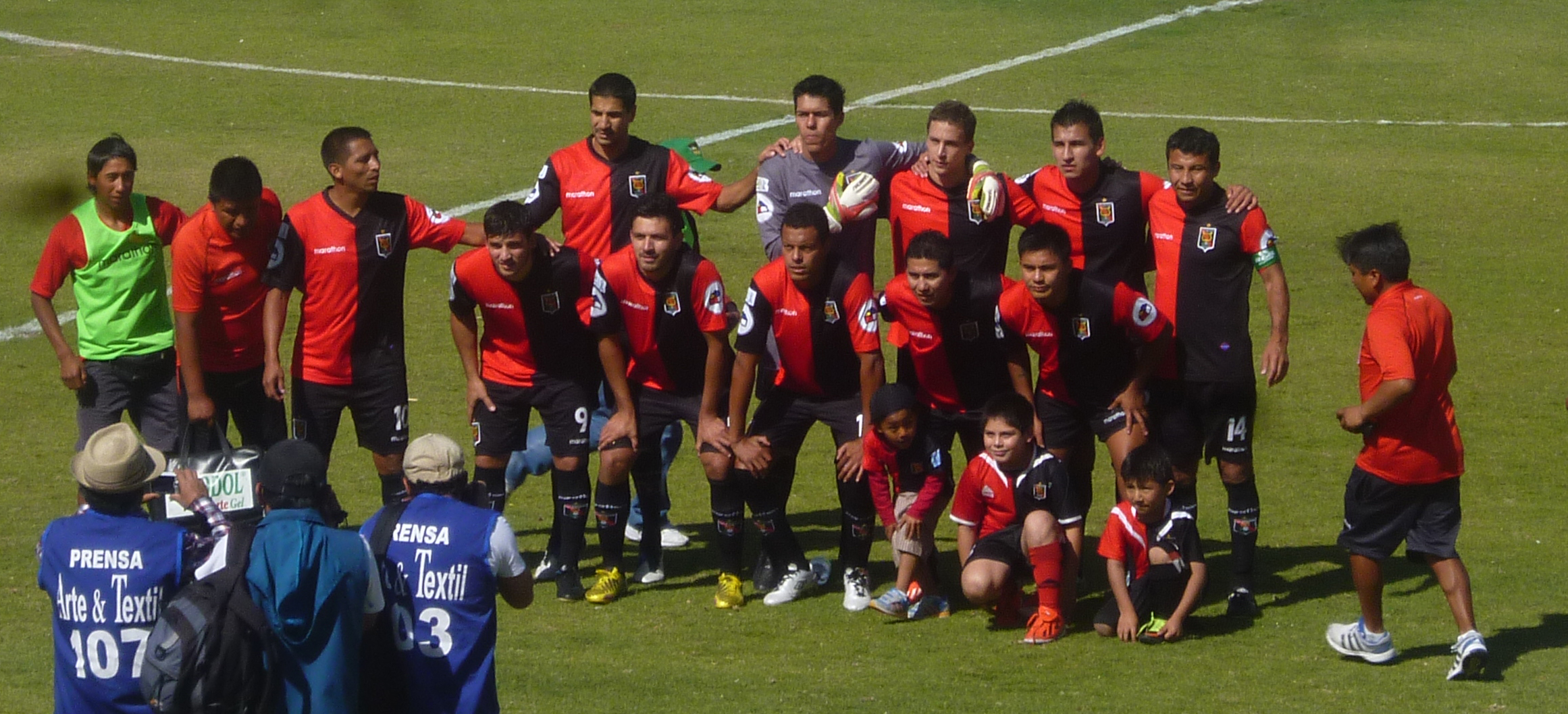 Foto del FBC Melgar 2013.